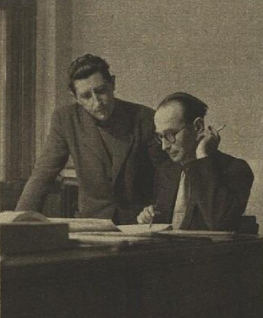 Miloslav Jareš (1903-1980), český rozhlasový, divadelní a filmový režisér